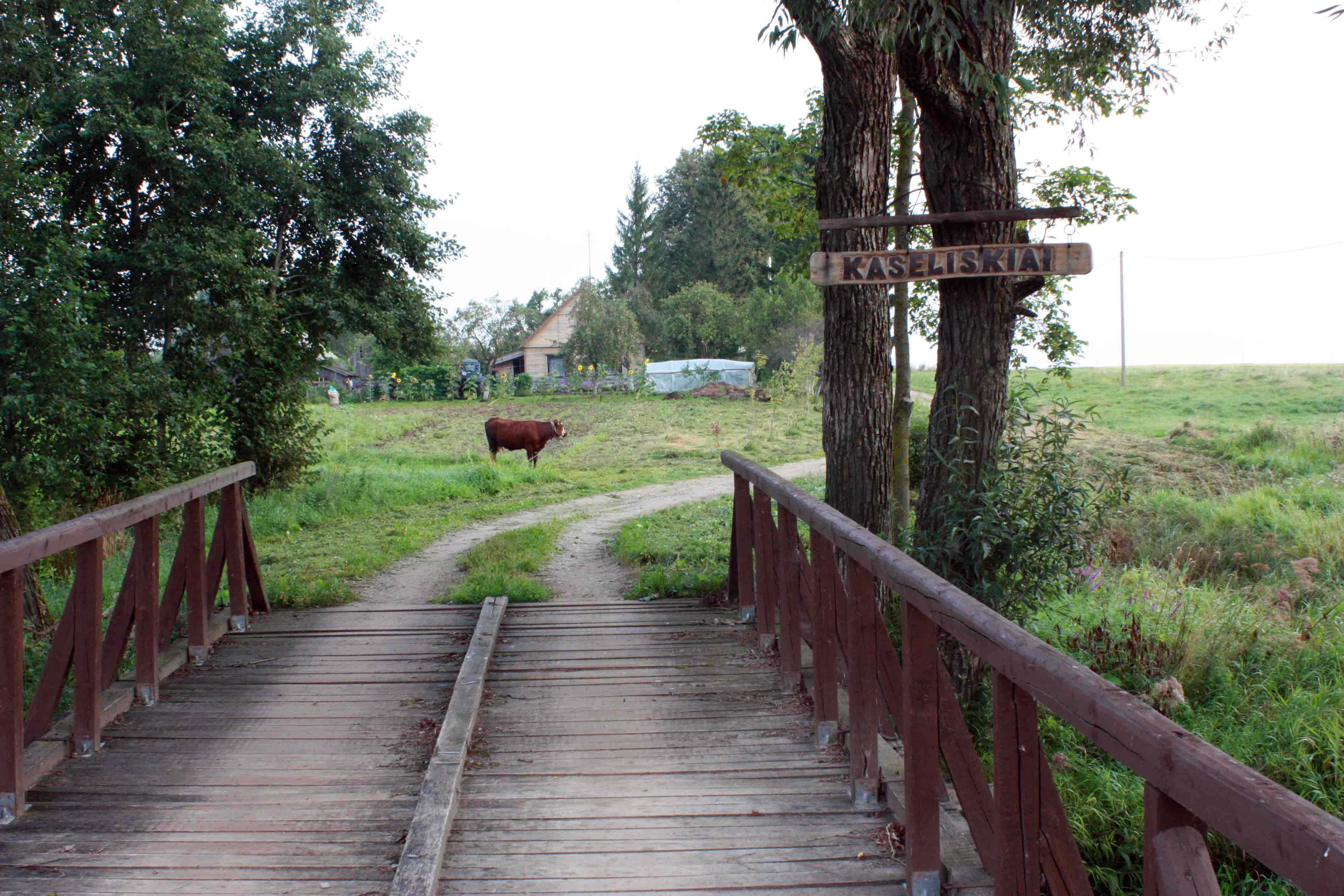 Kašeliškiai, Biržų rajonas.